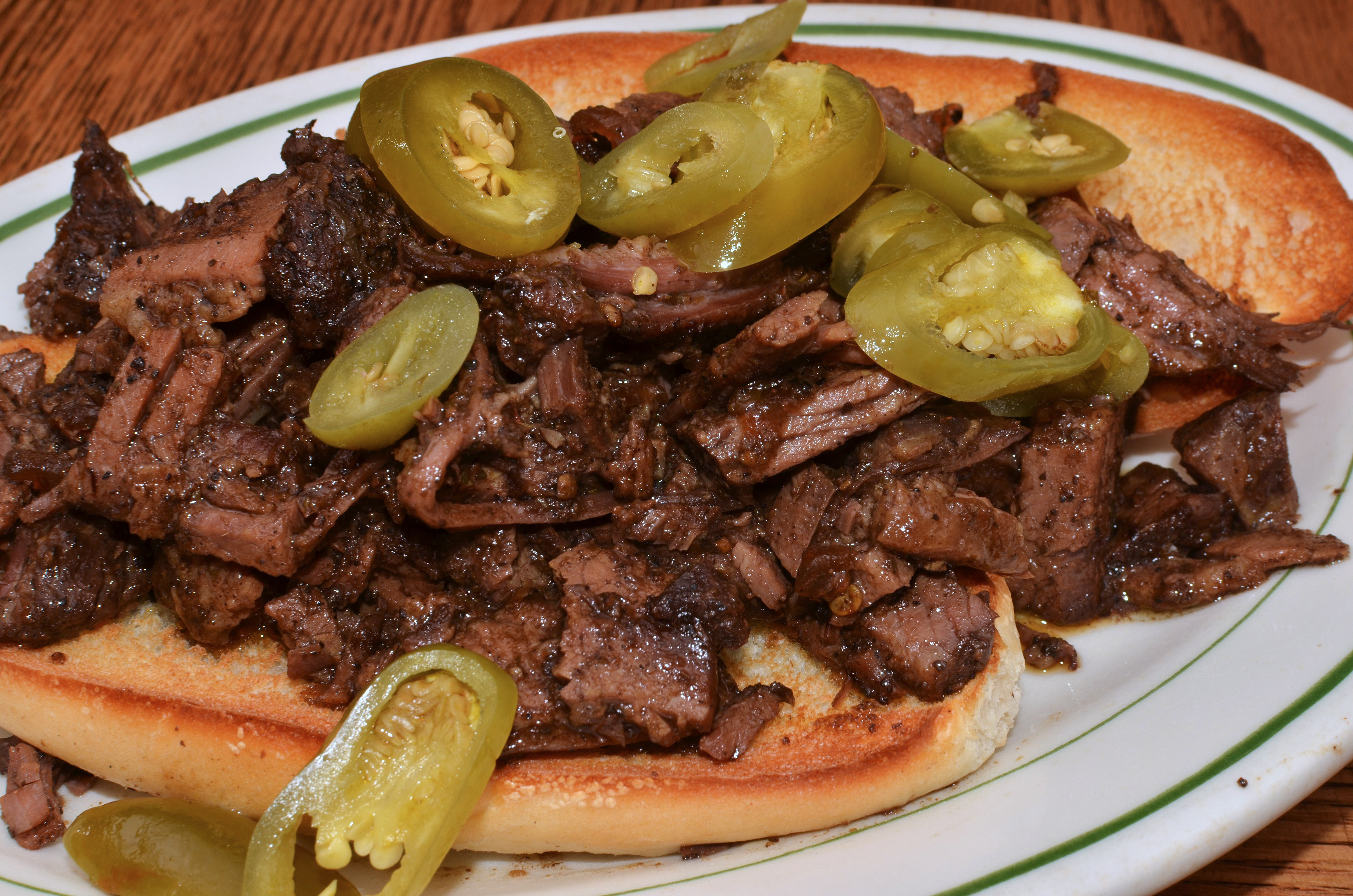 Mmm... day later brisket, sauced